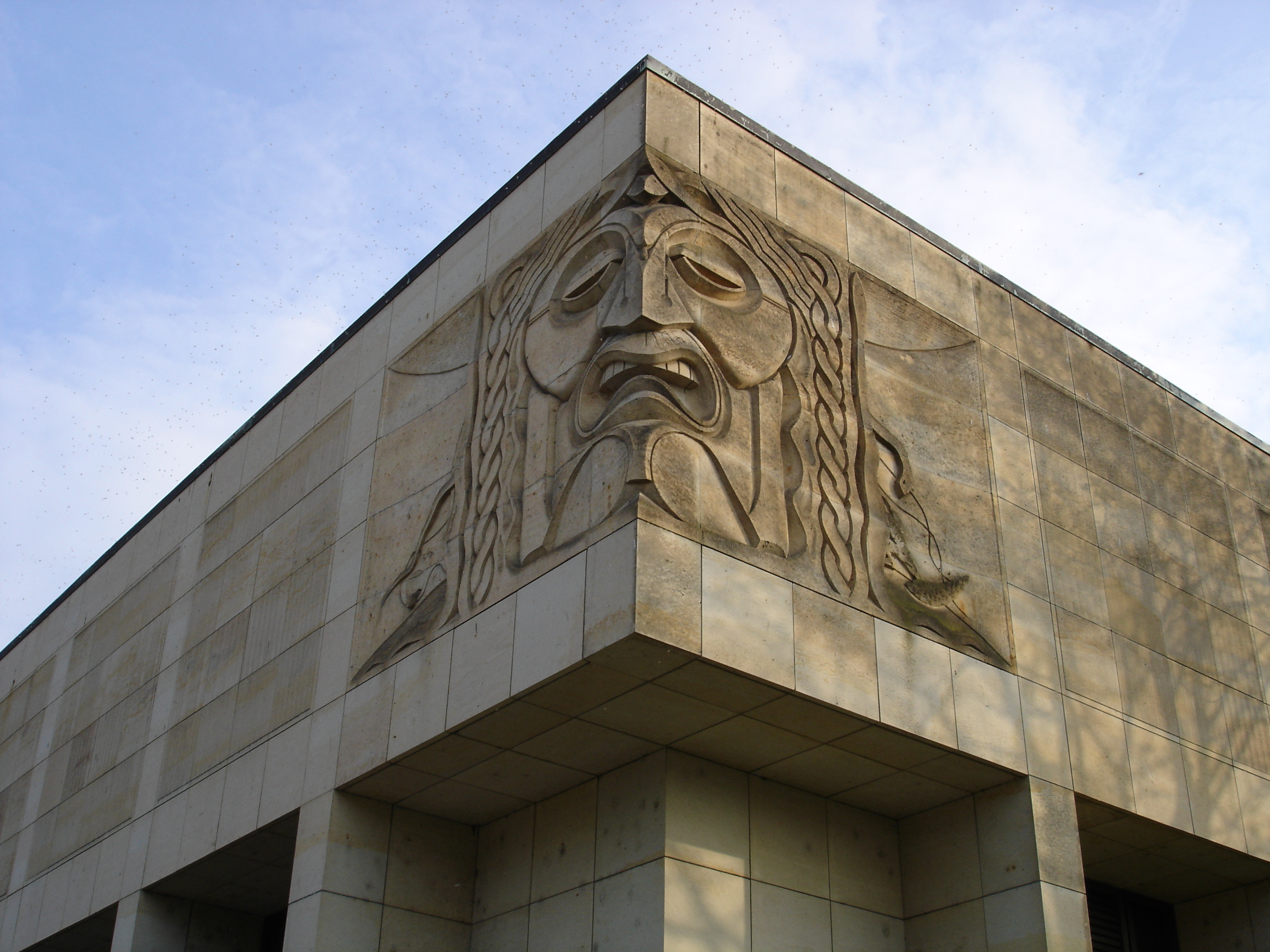 Dresden: Sandsteinmaske von Peter Makolies am Funktionsgebäude der Semperoper